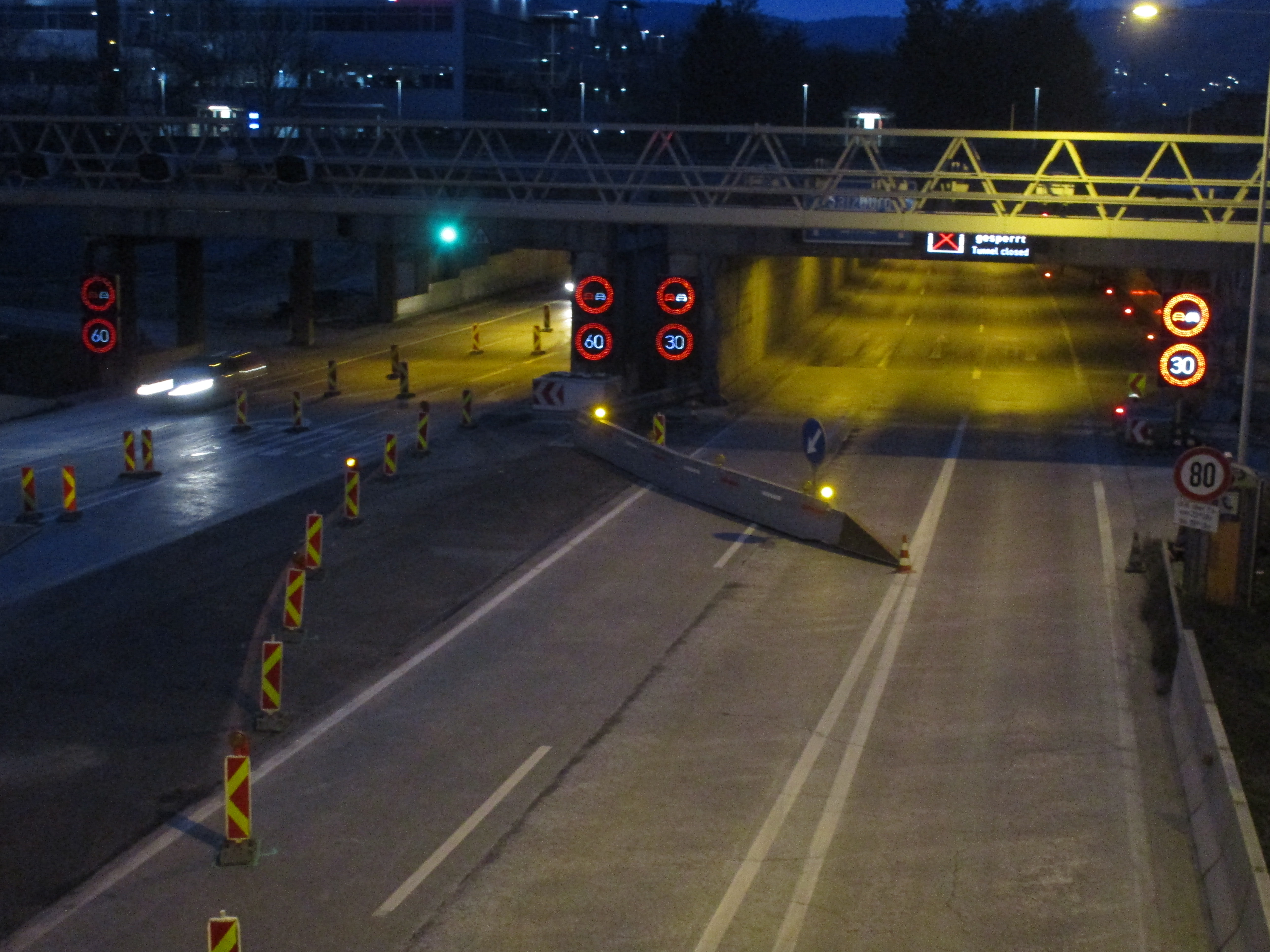 Überleitung Sanierung Plabutschtunnel